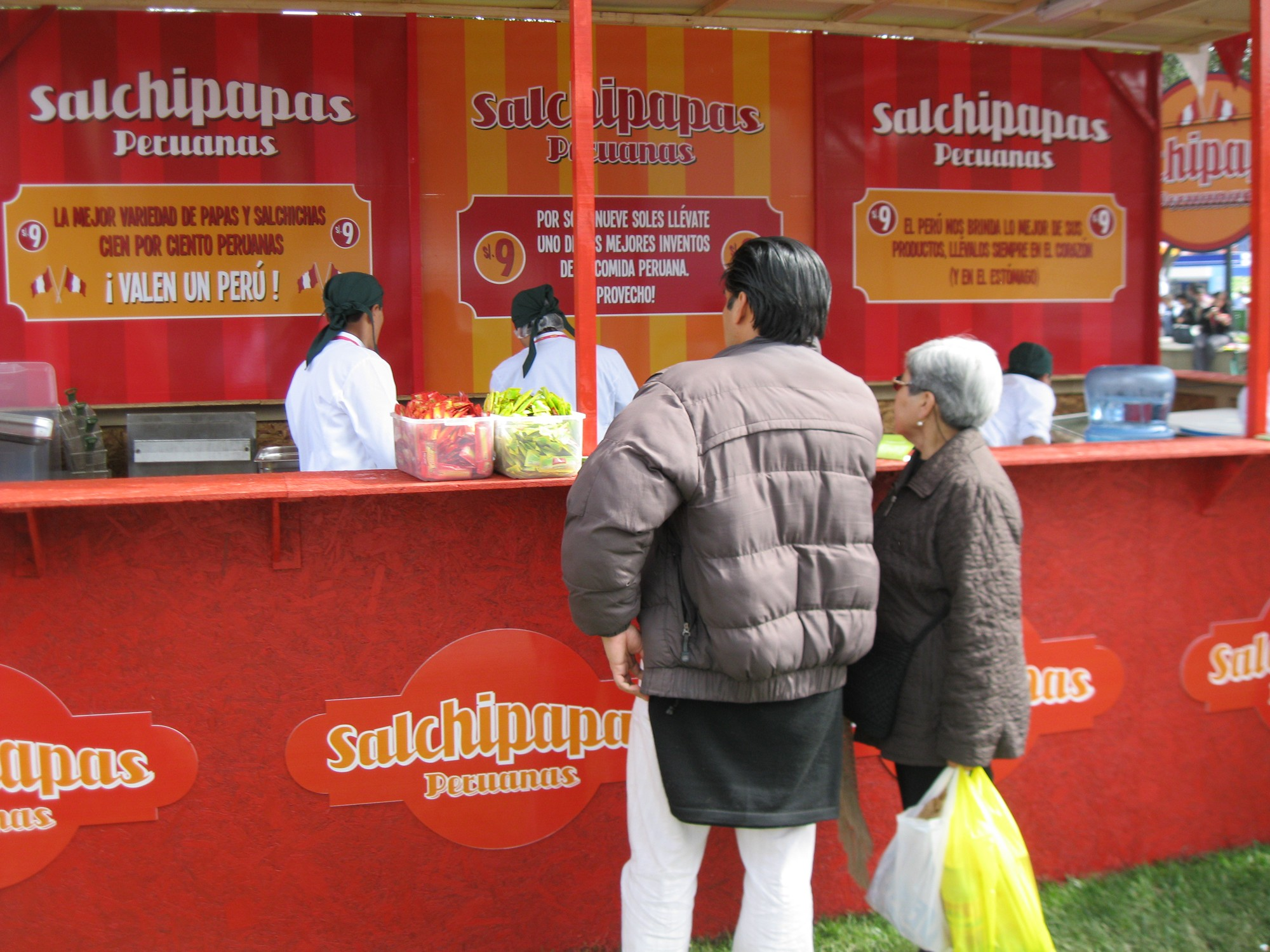 Puesto de venta de salchipapas en Lima - Perú.